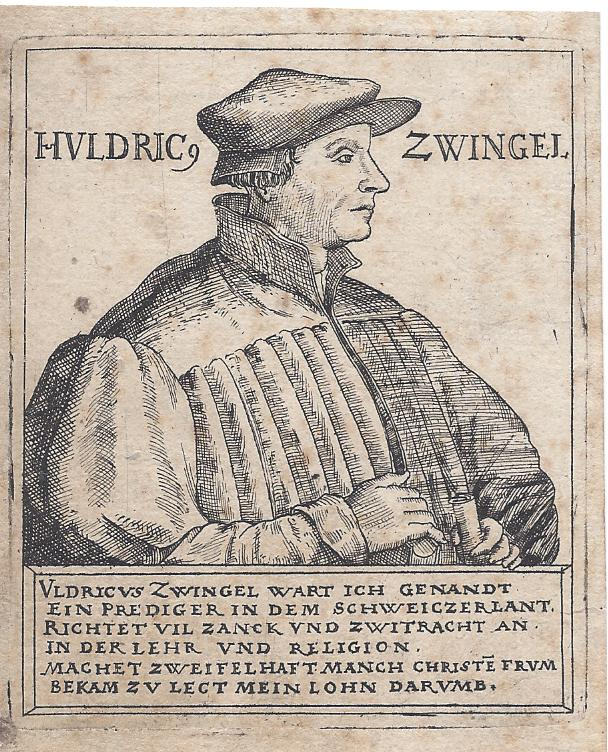 Huldrych Zwingli. Anonymer Augsburger Kupferstich um 1570 mit der Unterschrift: Vldricus Zwingel war ich genandt / Ein Prediger in dem Schweiczerlant. / Richtet vil Zanck und Zwitracht an / In der Lehr und Religion. / Machet zweifelhaft manch Christen frvm / Bekam zu lect mein Lohn darumb.